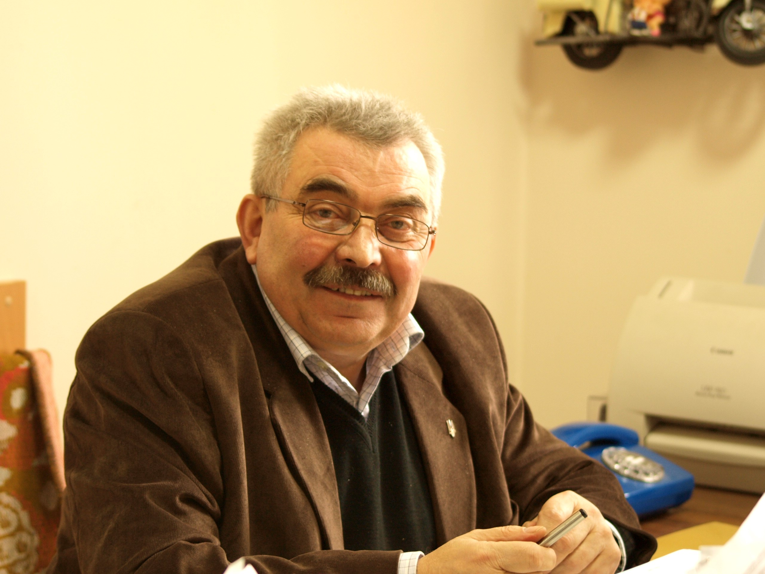 Царик Йосиф Володимирович.